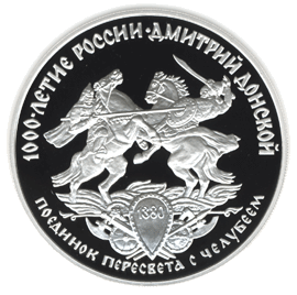 Монета Банка России — «Историческая серия», Дмитрий Донской, Поединок Пересвета с Челубеем, 3 рубля, реверс